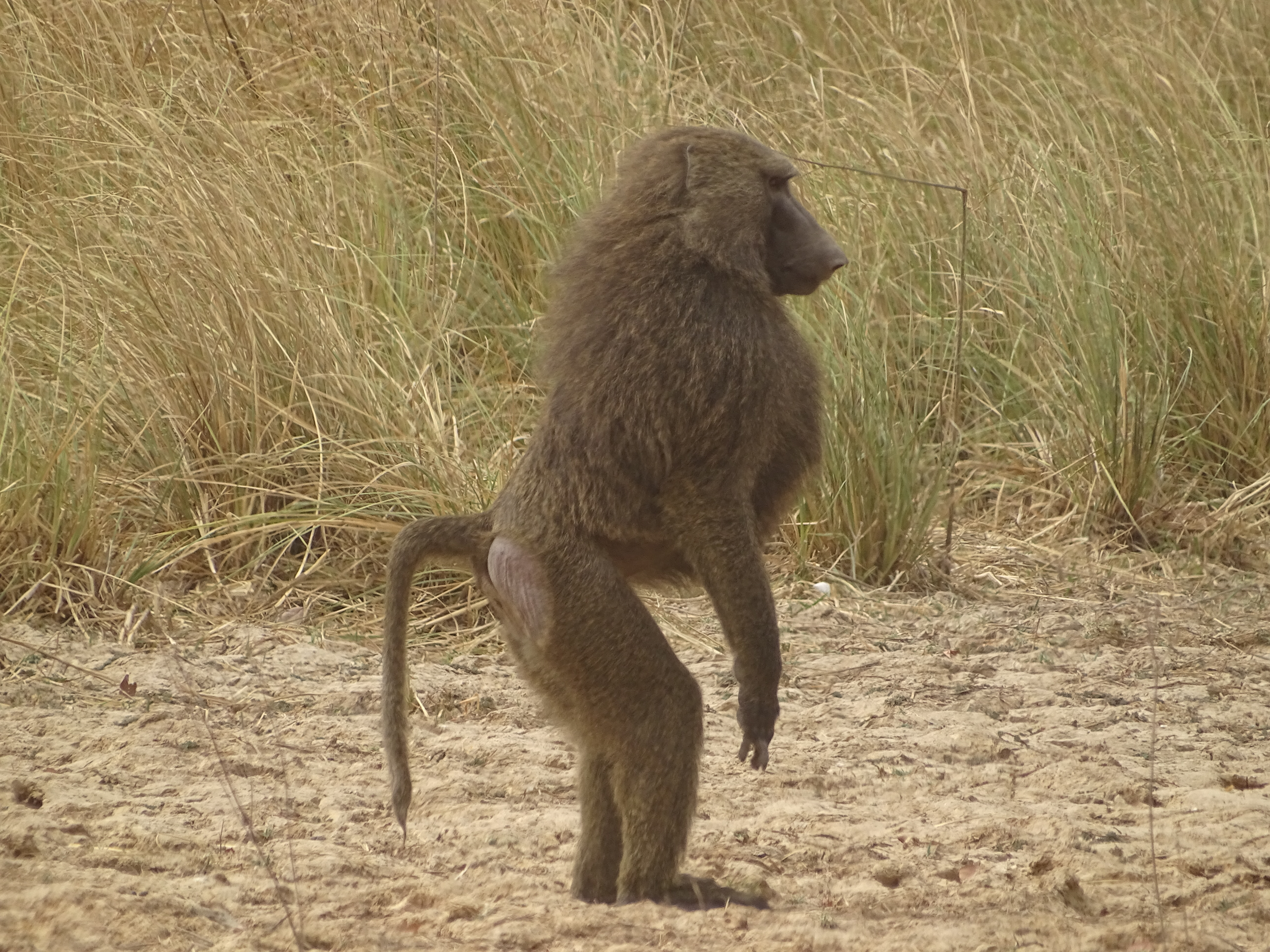 Babouin ou cynocéphale parc national de la pendjari au Bénin.